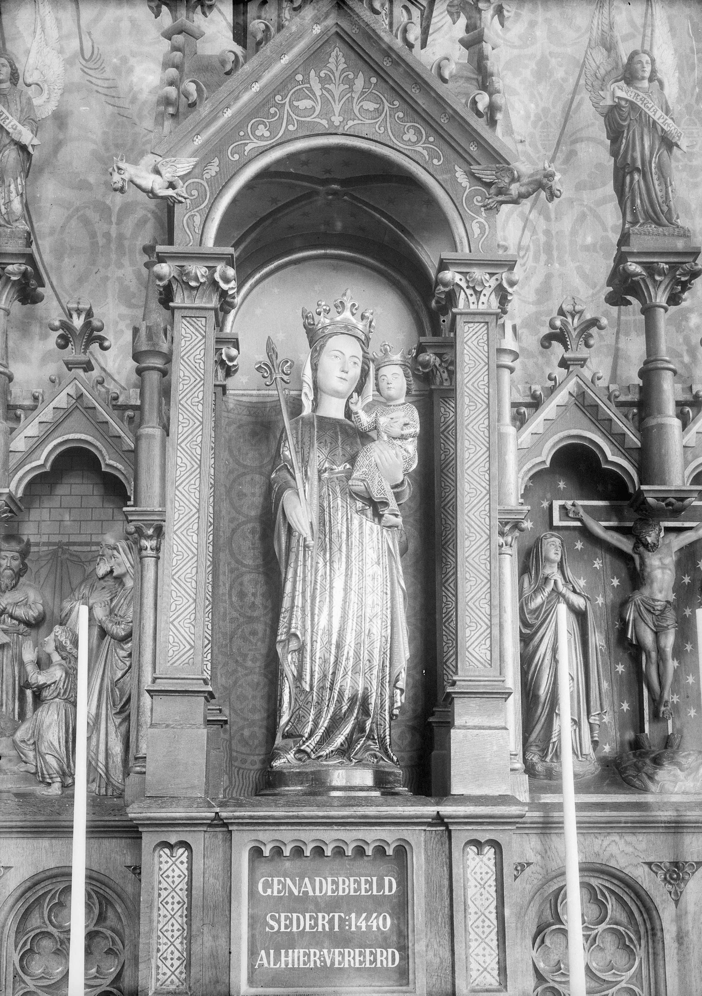 Rooms-Katholieke Kerk: Mariabeeld - Tienray, Kloosterstraat 1 - Troosteres der Bedrukten (1878 - 1944) - kerk is in 1944 vernield